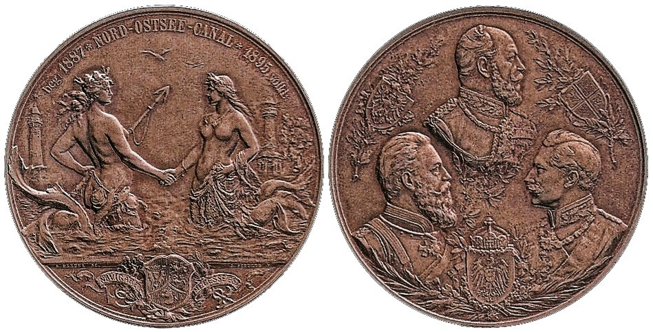 Erinnerungsmedaille aus Bronze für die zur Eröffnung des Nord-Ostsee-Kanals 1895 geladenen GästeDarstellung:Avers: Brustbilder von Kaiser Wilhelm I., Friedrich III. und Wilhelm II. von Preußen, Schild mit preussischem Adler auf Eichenzweig, Hohenzollernschild auf Lorbeerzweig und gekrönter Schild mit ReichsadlerRevers: Die personifizierte Nordsee (mit Harpune, Auster, Hummer, Taschenkrebs und Seehundkopf) reicht der personifizierten Ostsee die Hand, dahinter je ein Leuchtturm.Durchmesser: 59,56 mm; Stärke: 4 mm; Gewicht: 95,03 g